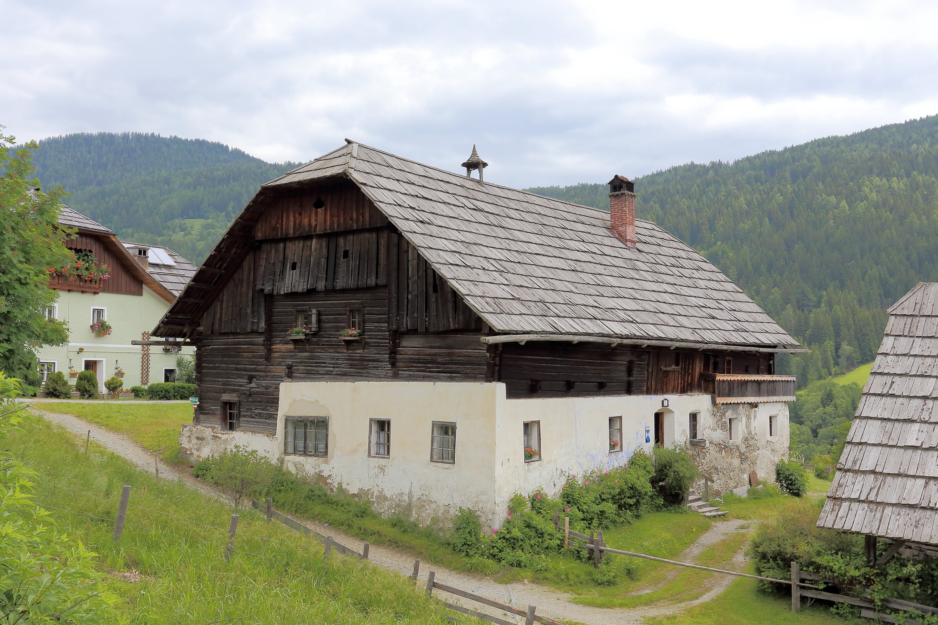 Das Karnergut in der Salzburger Gemeinde Lessach.